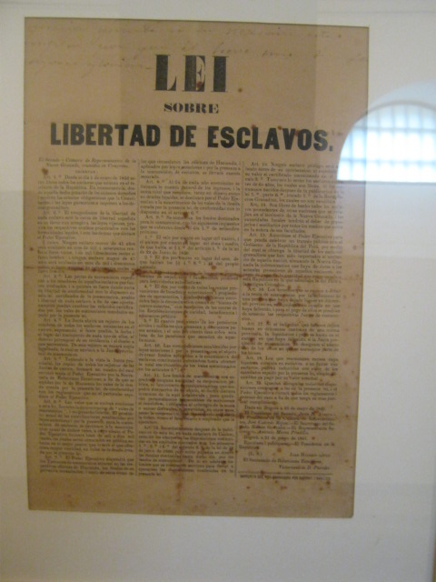 Ley sobre la libertad de esclavos, escrita en un Español colonial